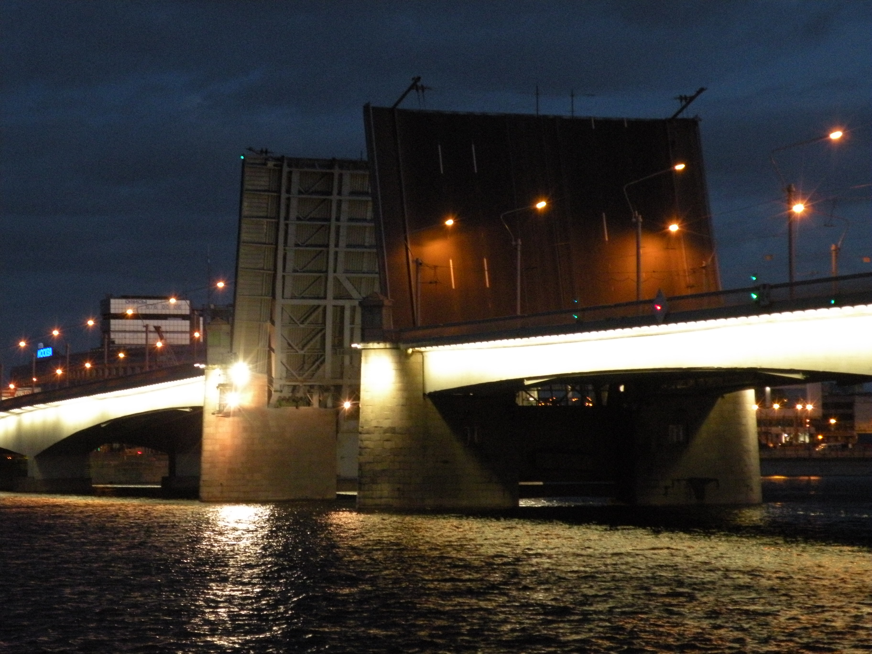 Alexander Nevsky Bridge